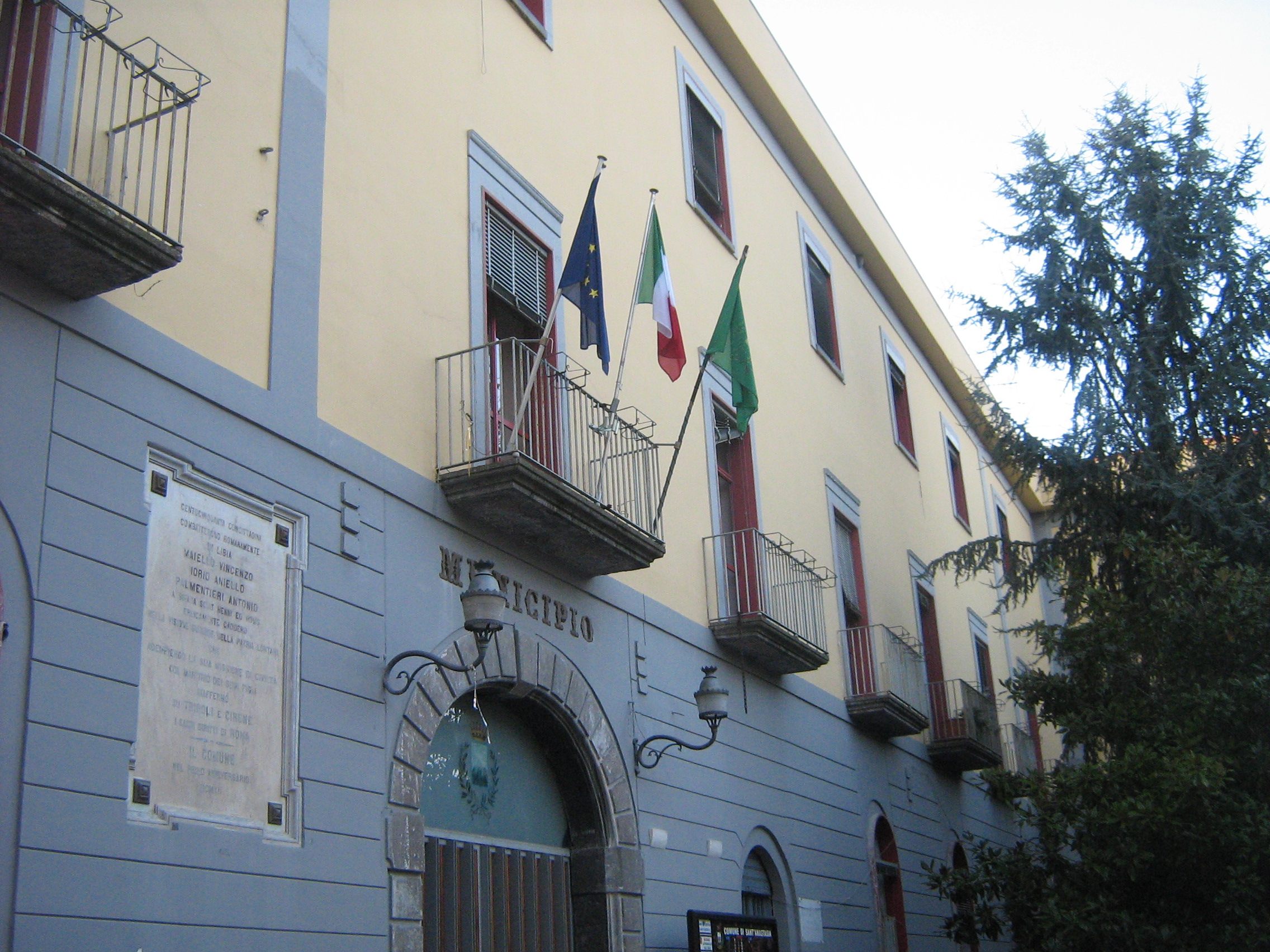 Autore:Lusb 11-01-2009